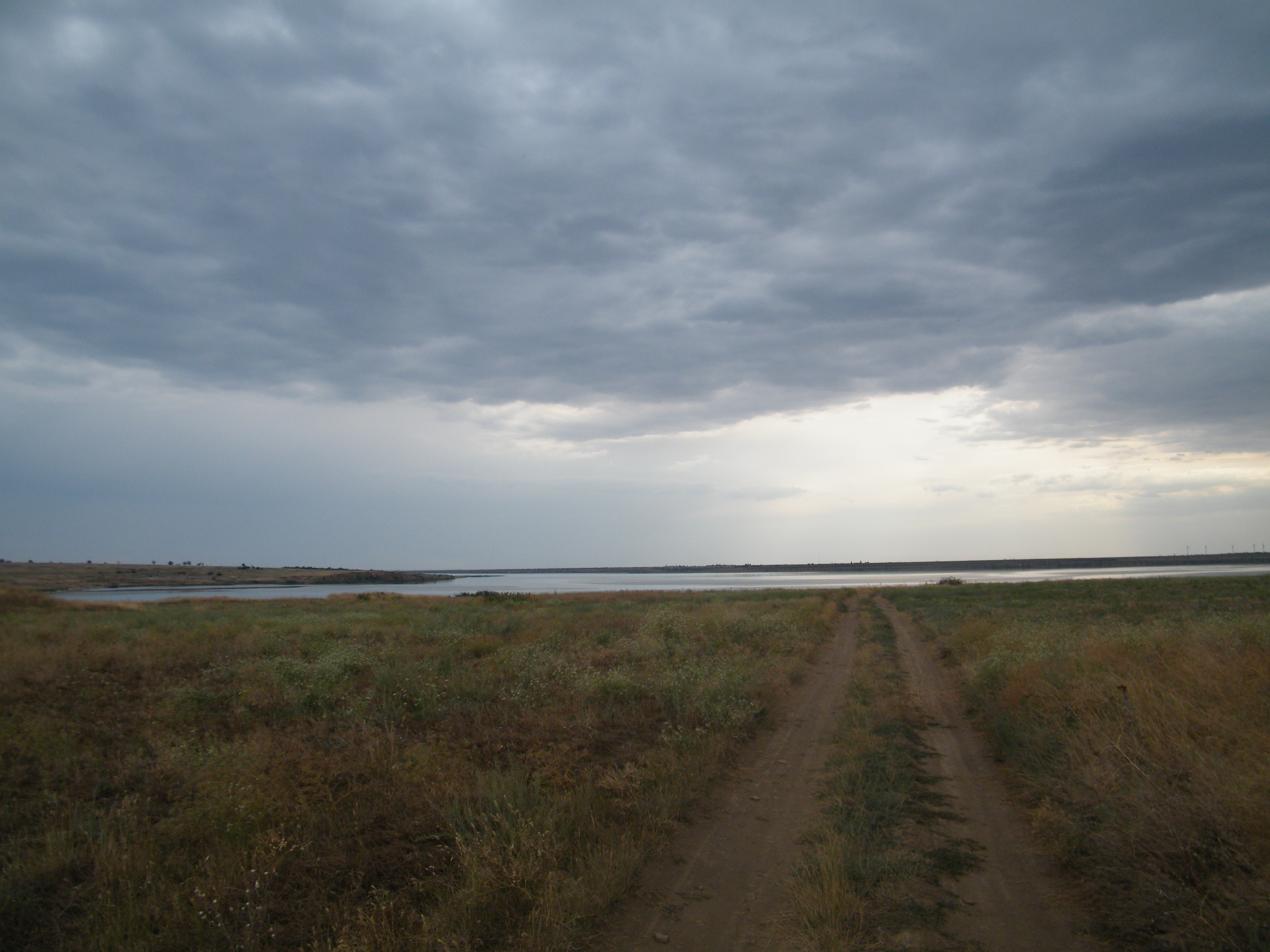 Природа біля села Осетрівка